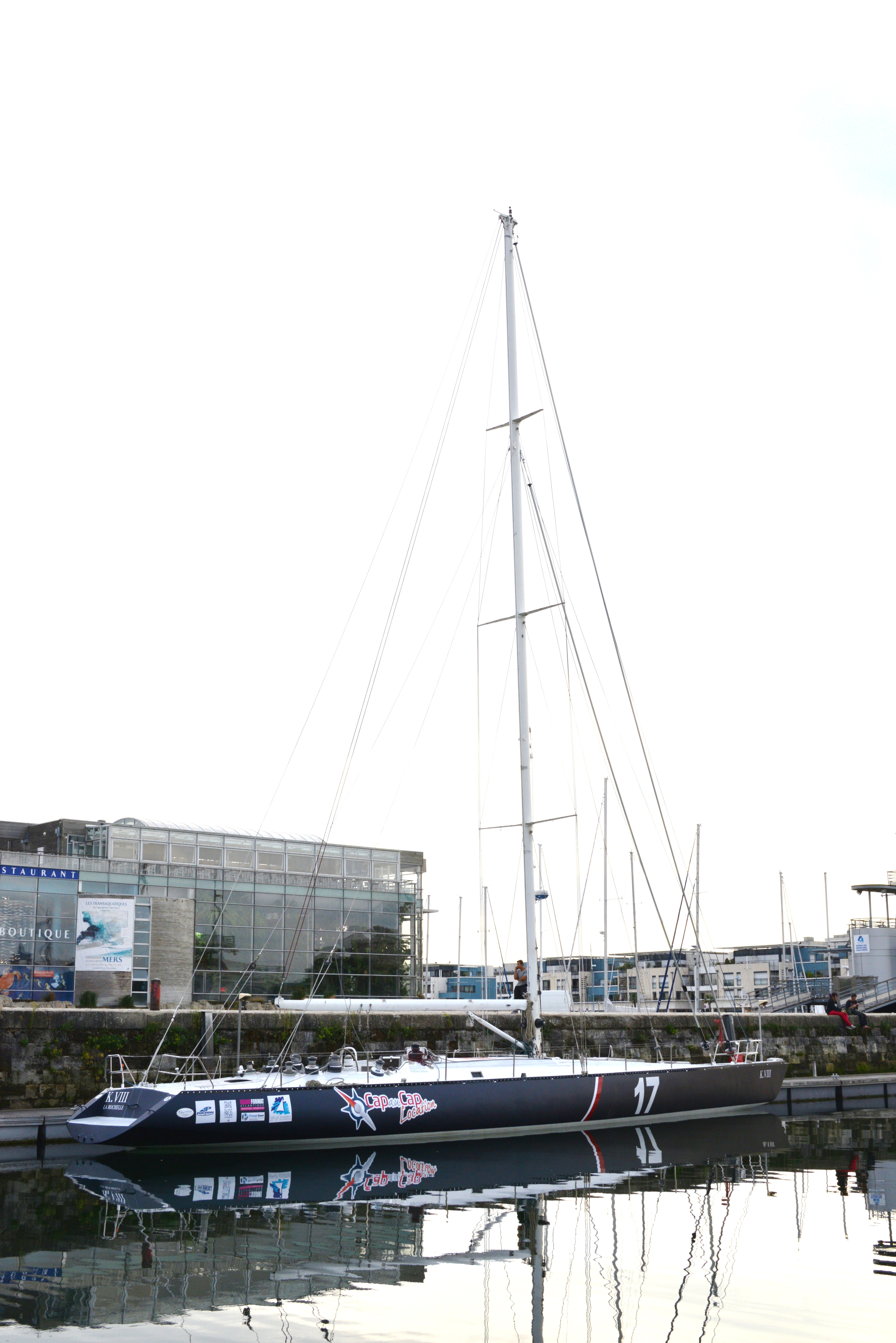 Le voilier de compétition « Kriter VIII » (sous le nom de « K.VIII ») amarré dans le Bassin des chalutiers à La Rochelle en septembre 2014. Le monocoque « Kriter VIII » a été lancé en 1980. La Rochelle, Charente-Maritime, France .